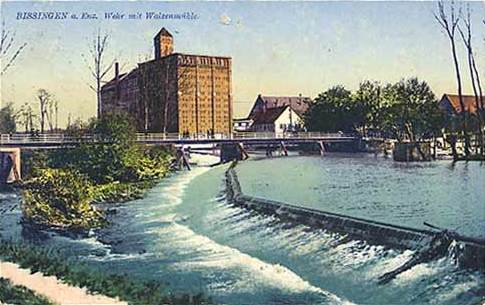 Ansichtskarte von Bissingen an der Enz: Wehr mit Walzenmühle